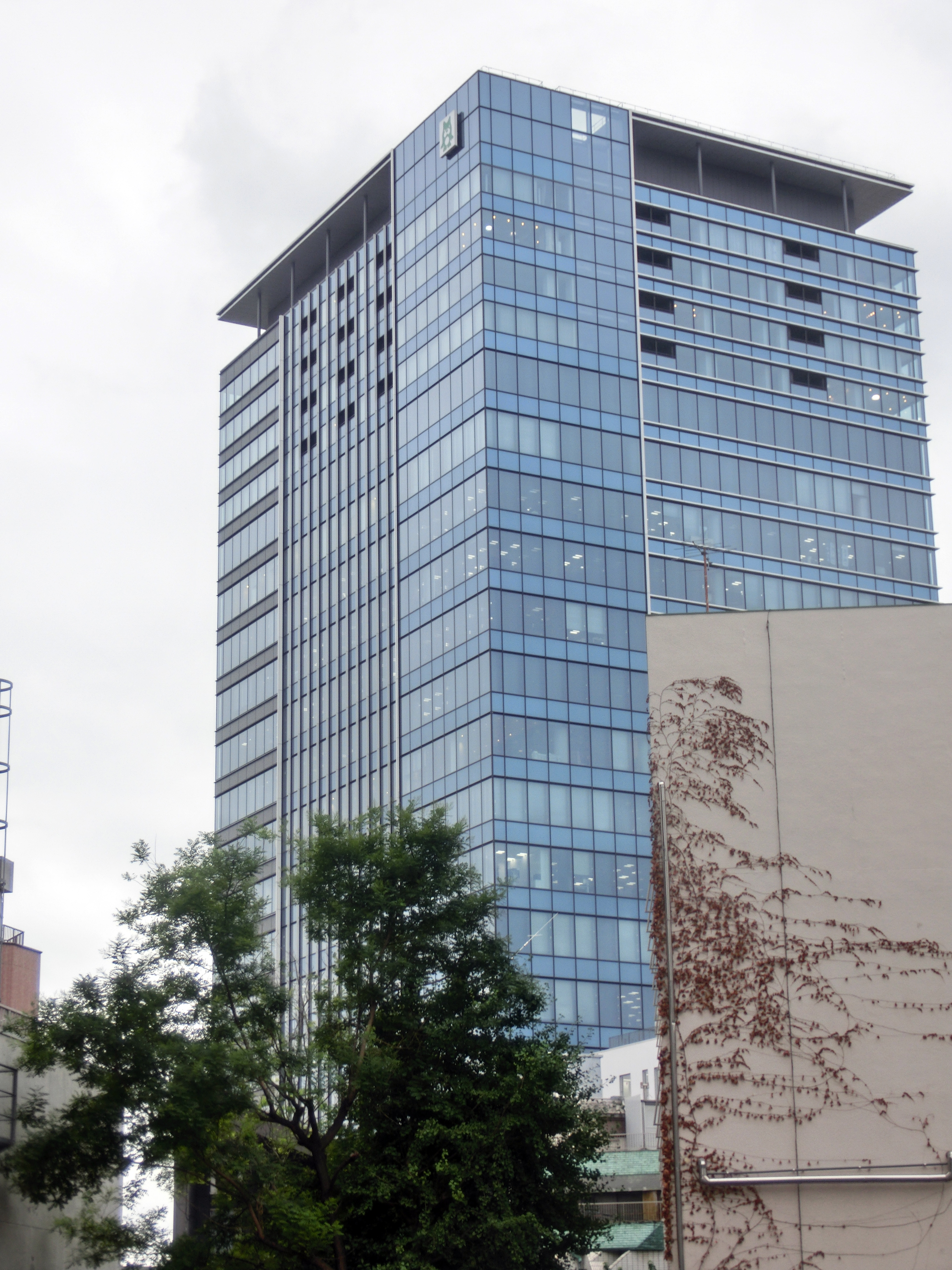 SHIBUYA ABEMAタワーズ